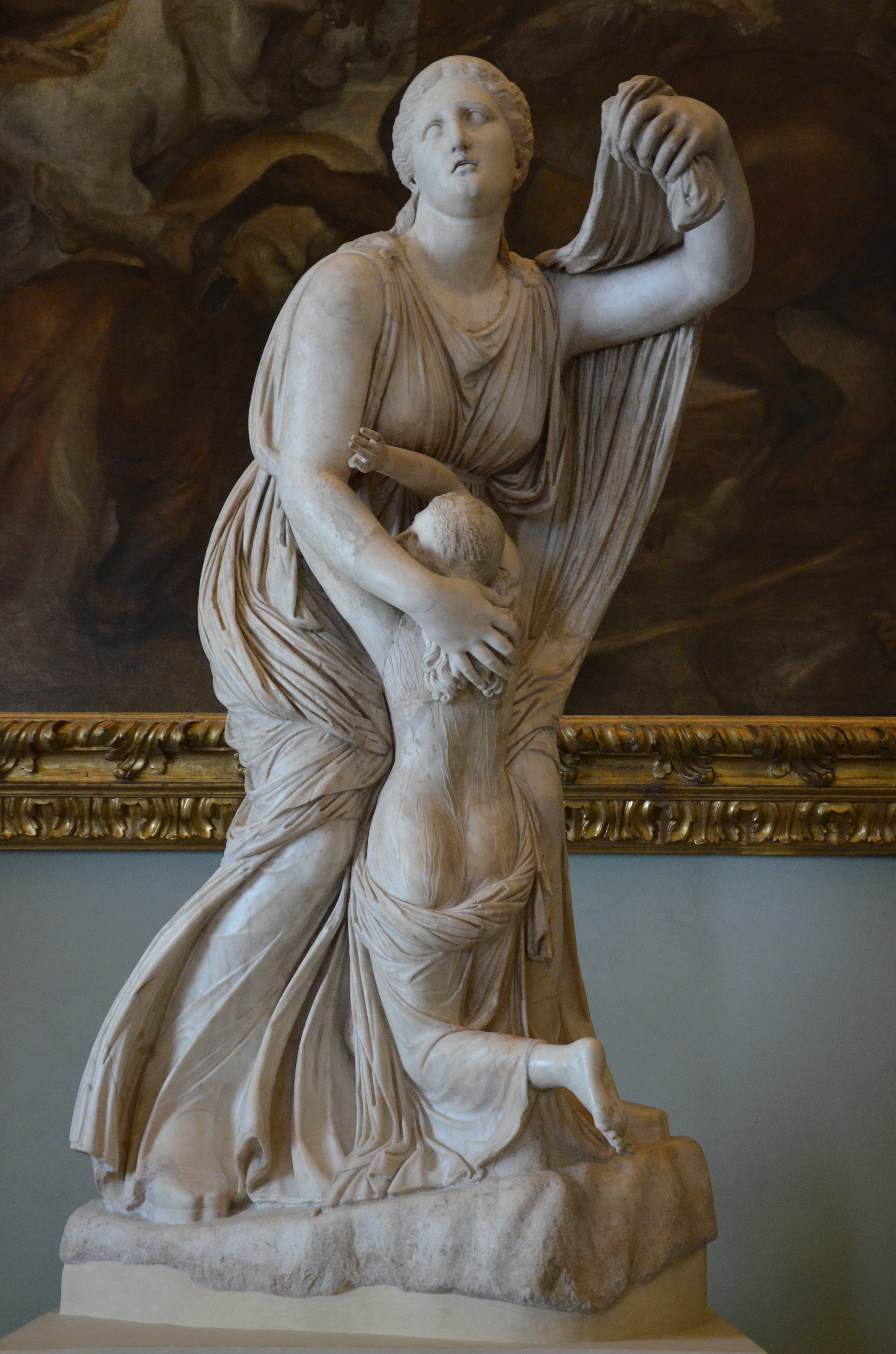 The so-called Florentine Niobids, discovered in Rome in 1583, Galleria degli Uffizi, Florence